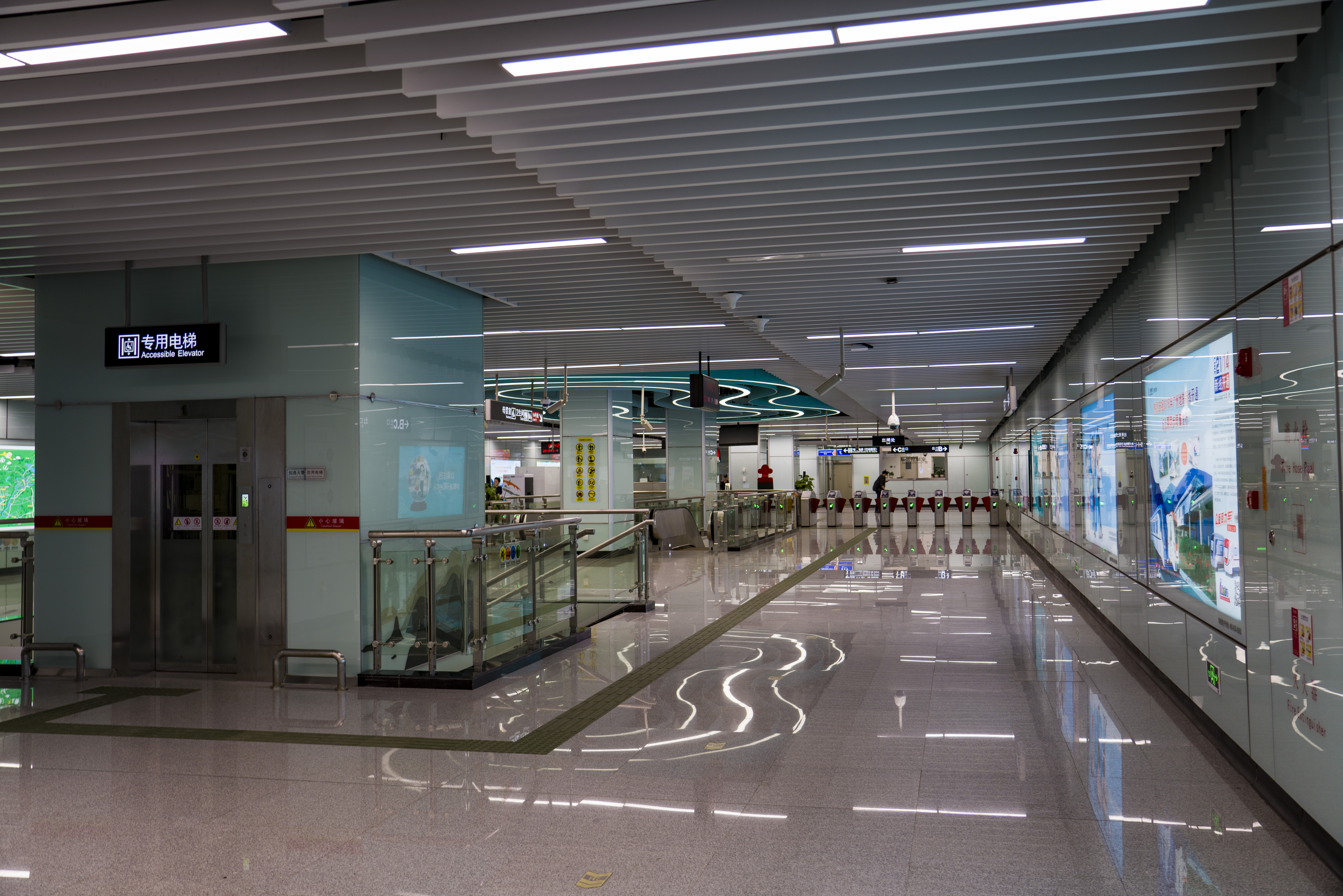 夏良站站厅